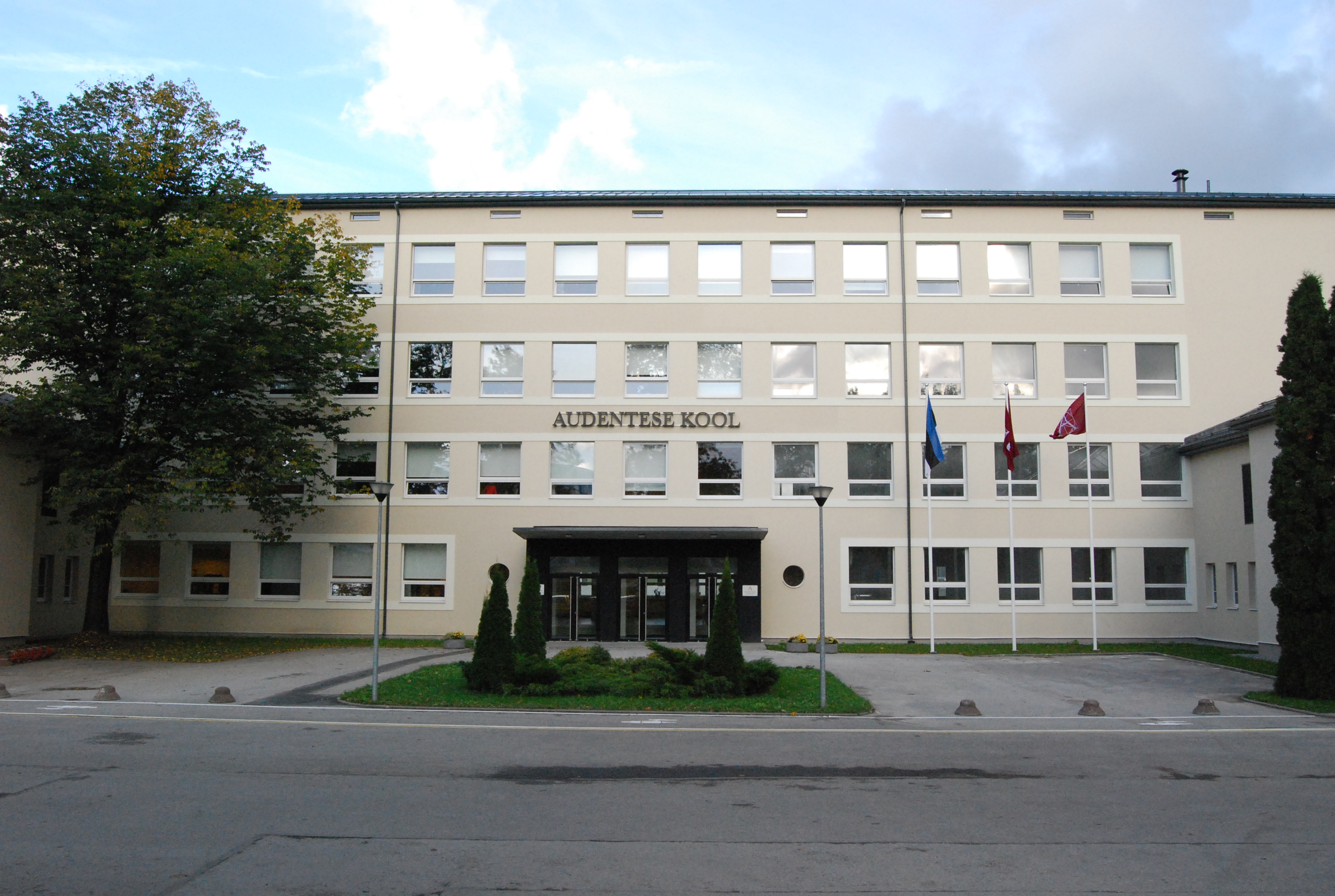 Audentese Erakooli suur koolimaja